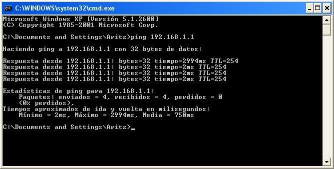 Ping komandoaren erabilera Windows sisteman.